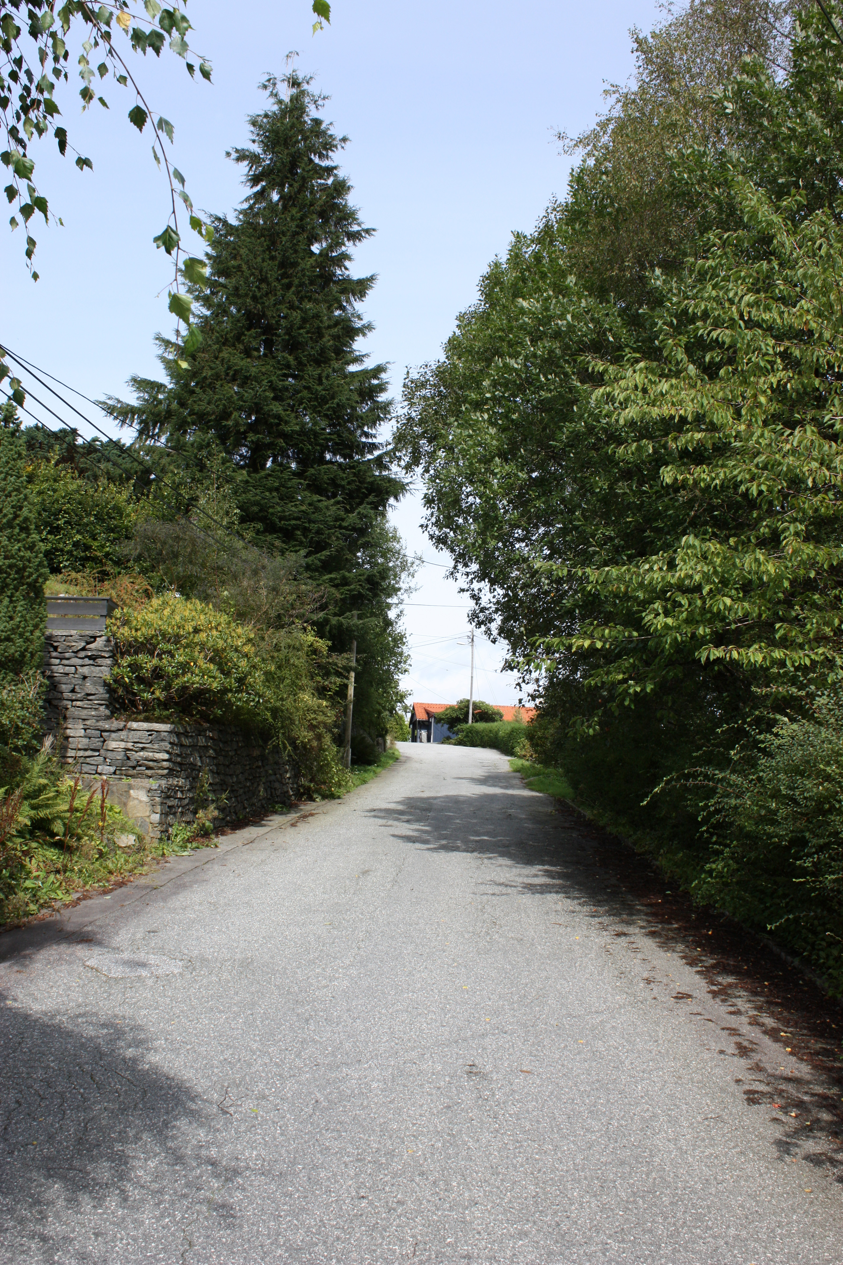 Øvre Bjørkåsen, Fana, Bergen. August 2009.